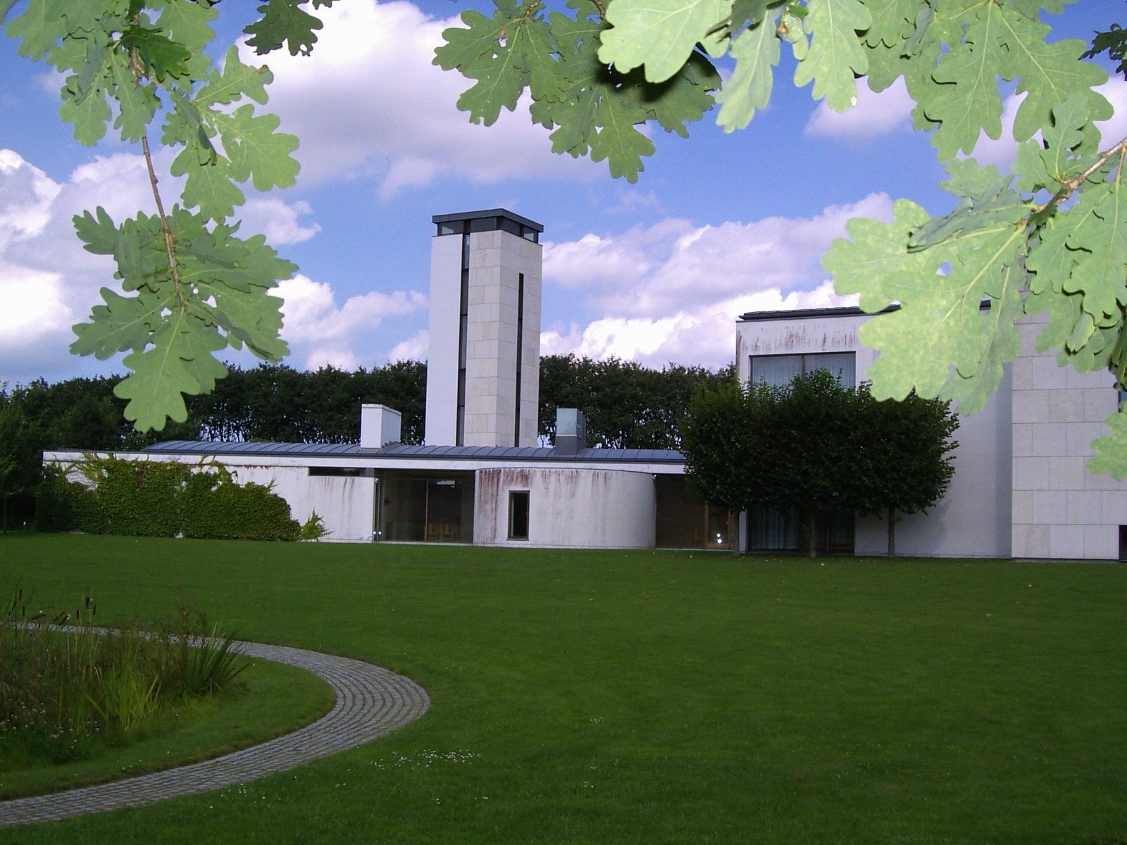 Engholmkirken set fra syd, Allerød Kommune, Hillerød provsti, Helsingør stift